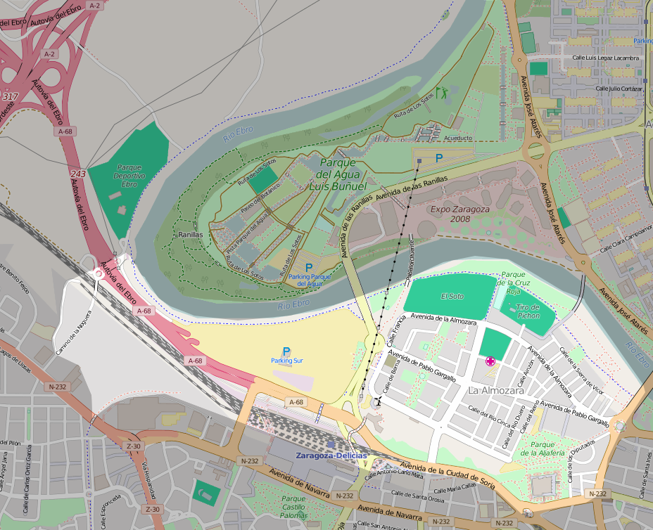 Mapa del distrito de la Almozara en Zaragoza.